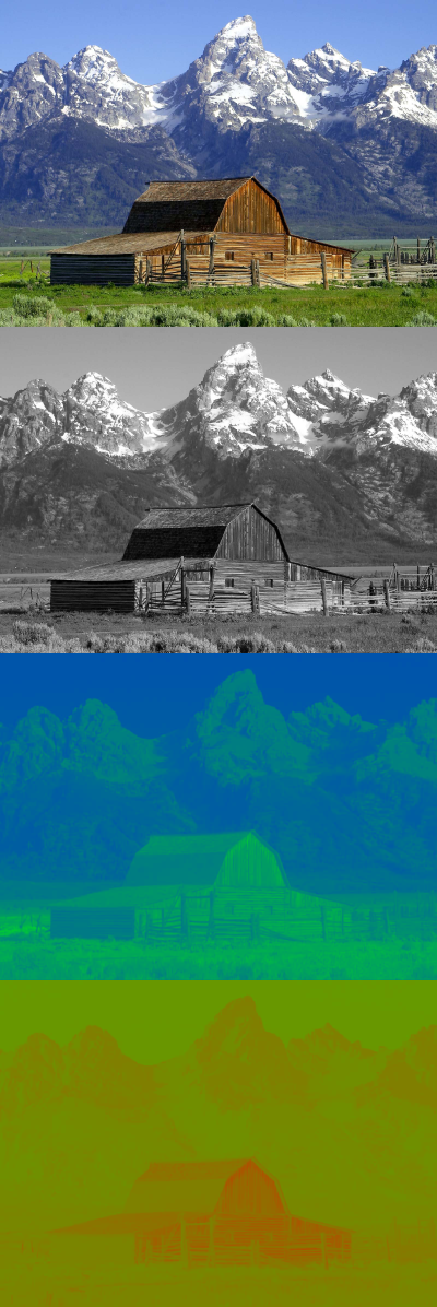 YUV colorspace